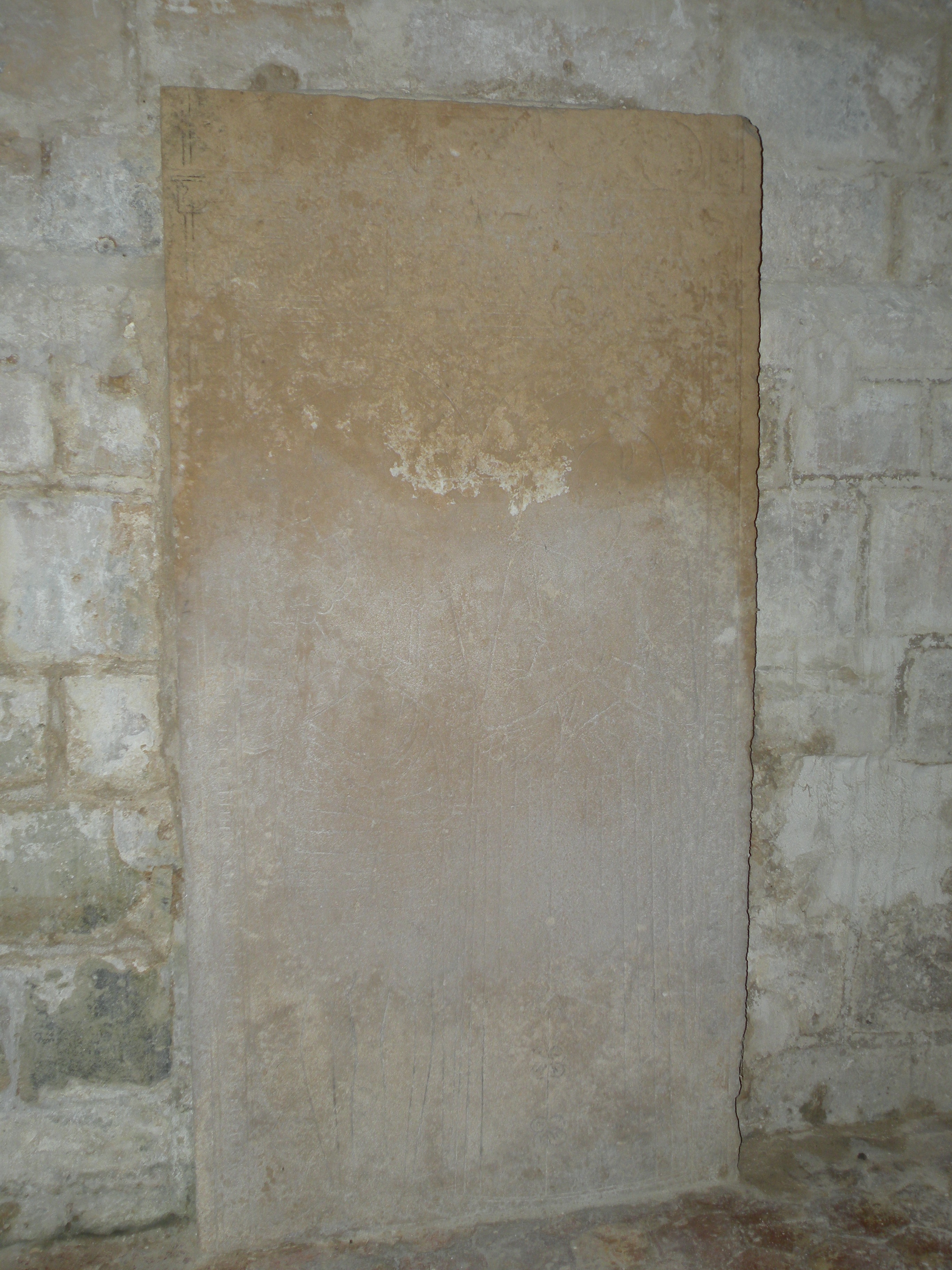 Dalle funéraire de Jehan Testu et de Geneviève Le Sueur, sa femme, morte en 1613.